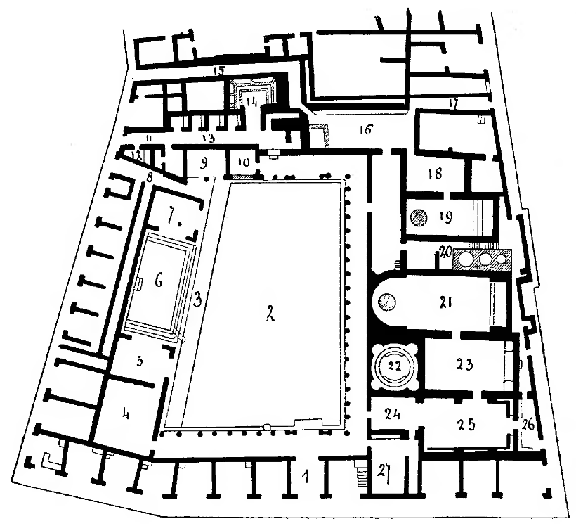 Grundriss der sog. Stabianer Thermen in Pompeii Durch den Haupteingang 1 und den Nebeneingang 8 betritt man die Palaestra 2; rechts an dieser ist 3 eine mit Fliesen belegte Bahn, auf der von 9 aus Steinkugeln gerollt wurden, deren zwei hier gefunden sind, 10 Platz eines Aufsehers der Palaestra (?). Weiter links das Schwimmbassin 6 und neben demselben zwei, ursprünglich je ein flaches Bassin enthaltende bedeckte Räume, 5 und 7, etwa 0, 65 m. tief, in welche aus der Westwand ein Wasserstrahl fiel. Sie dienten wohl zu Abwaschungen und Douchebädern; doch ist in 7 das Bassin später ausgefüllt und der Raum anderweitig verwandt worden. 4 Auskleideraum mit Spuren von Schränken an den Wänden. Rechts an der Palaestra die eigentlichen Baderäume: 21–25 Männer-, 16–19 Frauenbad, in der Mitte zwischen beiden die Heizvorrichtung 20. Und zwar sind 24 + 25 und 16 Apodyterien, dieses mit zwei besonderen Strasseneingängen 15, 17, jenes mit zwei Vorräumen 26, 27, welche Bänke für die wartenden Diener enthalten. 22 Frigidarium, während 16 in einer Ecke das Bassin für das kalte Bad enthält. 18, 23 Tepidarien, 19, 21 Caldarien, beide mit alveus am einen und labrum am anderen Ende. Endlich liegen an dem Gange 13, mit Eingang von der Strasse und von der Palaestra, vier in der letzten Zeit nicht gebrauchte Einzelzellen mit je einer gemauerten Wanne, und der Abtritt 14. (Beschreibung vom Urheber)